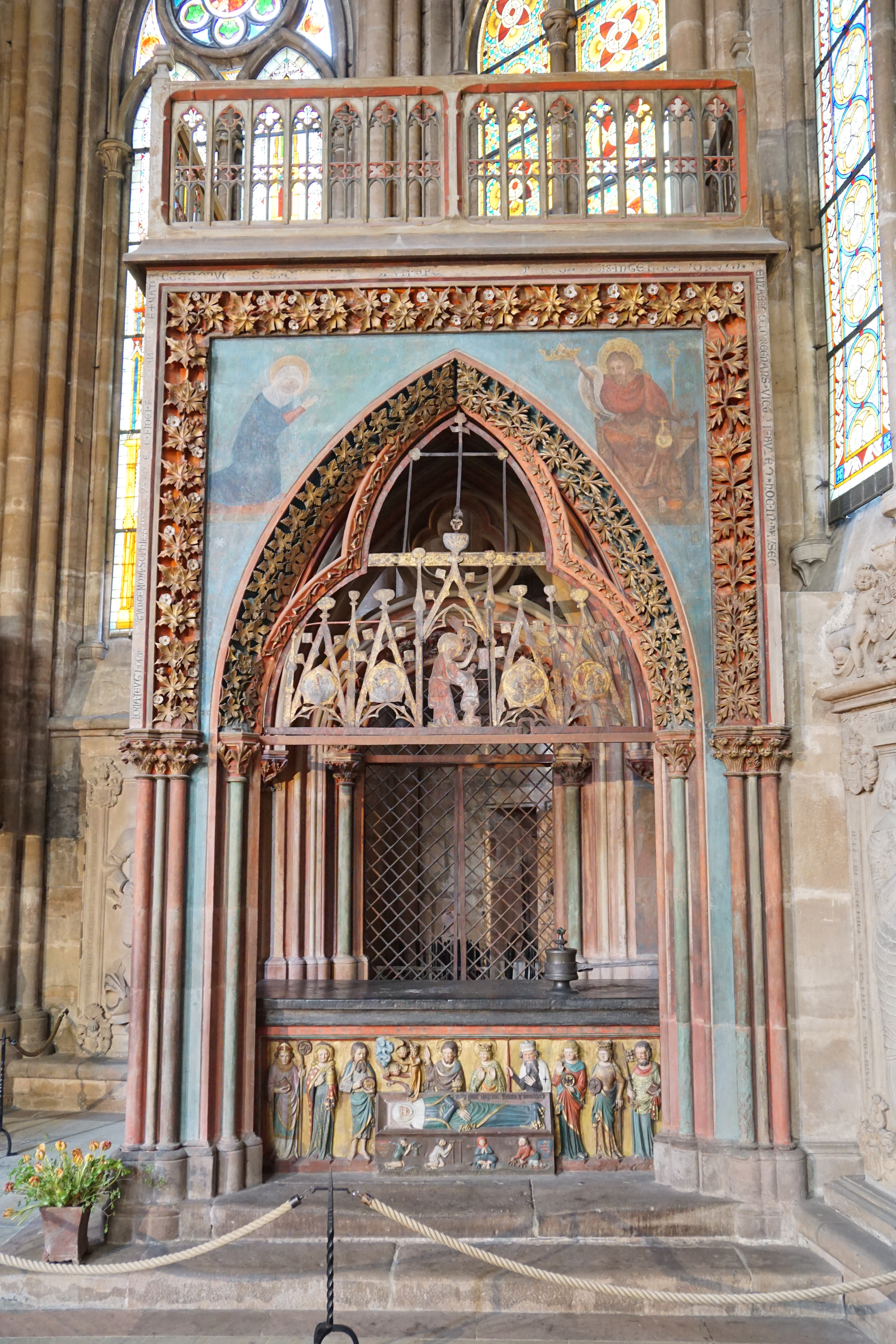 Siehe Dateiname